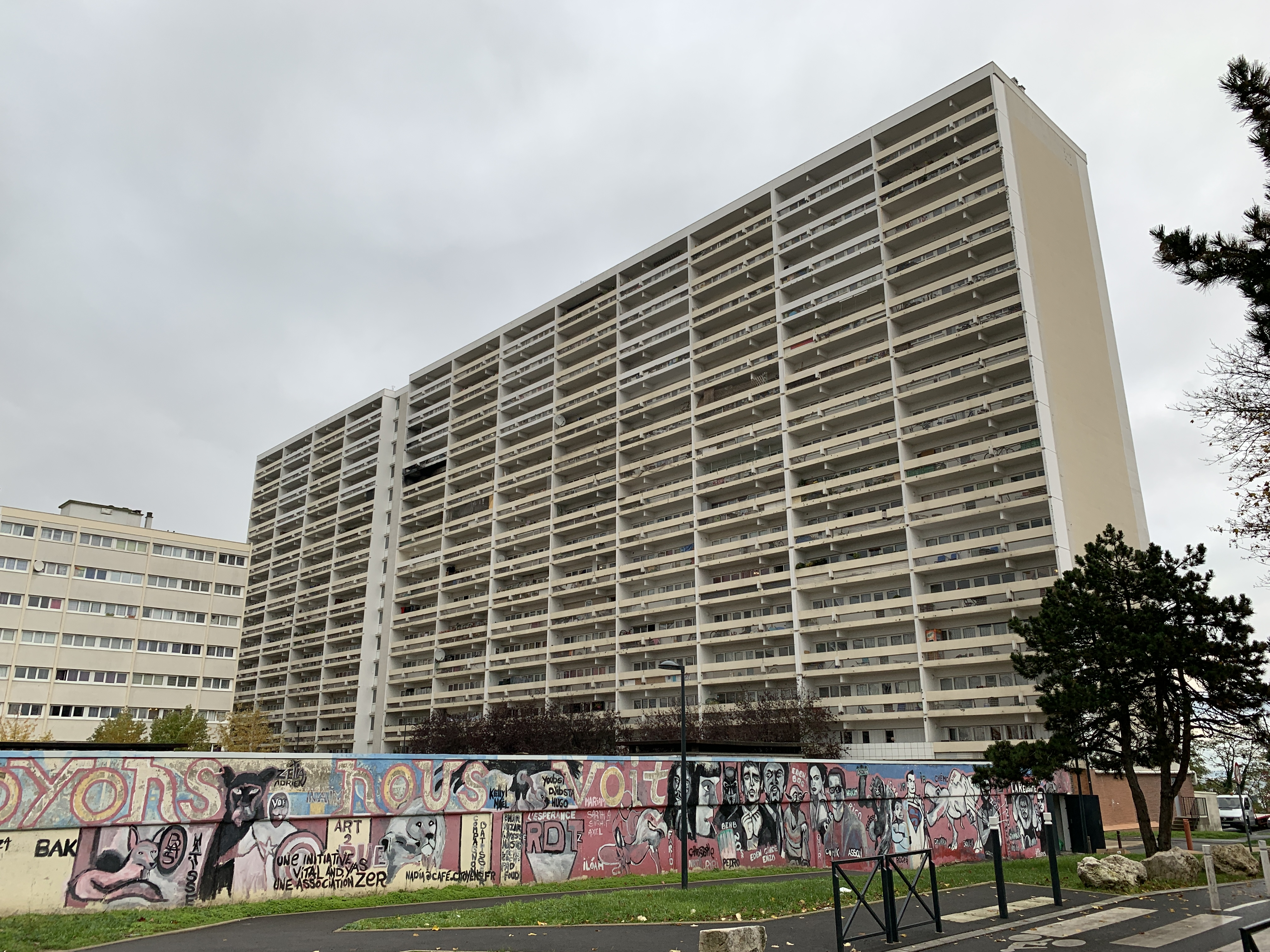 Barres d'immeuble à La Redoute, Fontenay-sous-Bois.